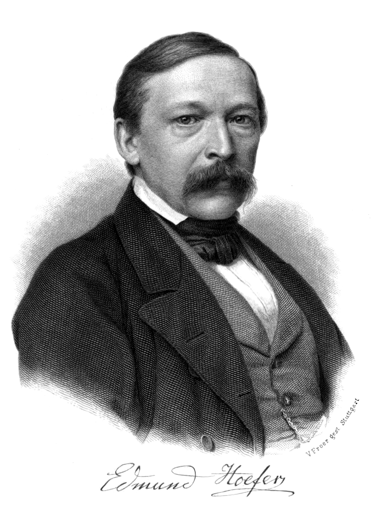 Porträt Edmund Hoefer. In: Edmund Hoefer’s Erzählende Schriften. Adolph Krabbe, Stuttgart 1865, Band 1